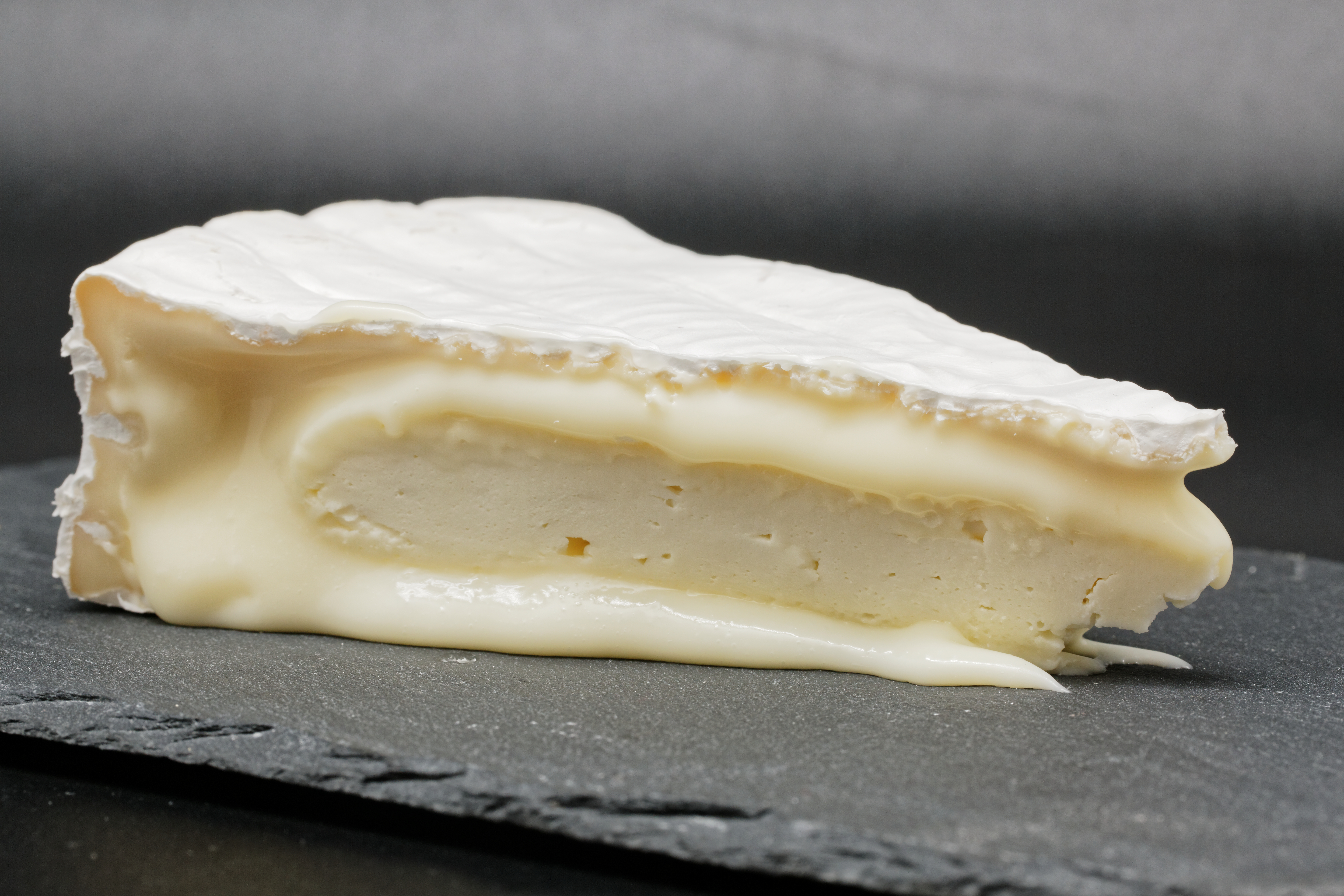 Le brie de Nangis est un fromage au lait cru de la région de la Brie et de Nangis.